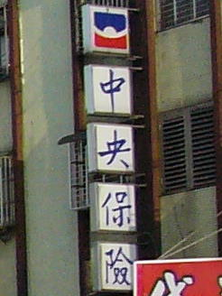 基隆市七堵區實踐路294巷、實踐路口公寓外牆上，寶來證券集團中央產物保險廣告燈箱。頂端圖案為寶來證券集團成員公司共同商標。